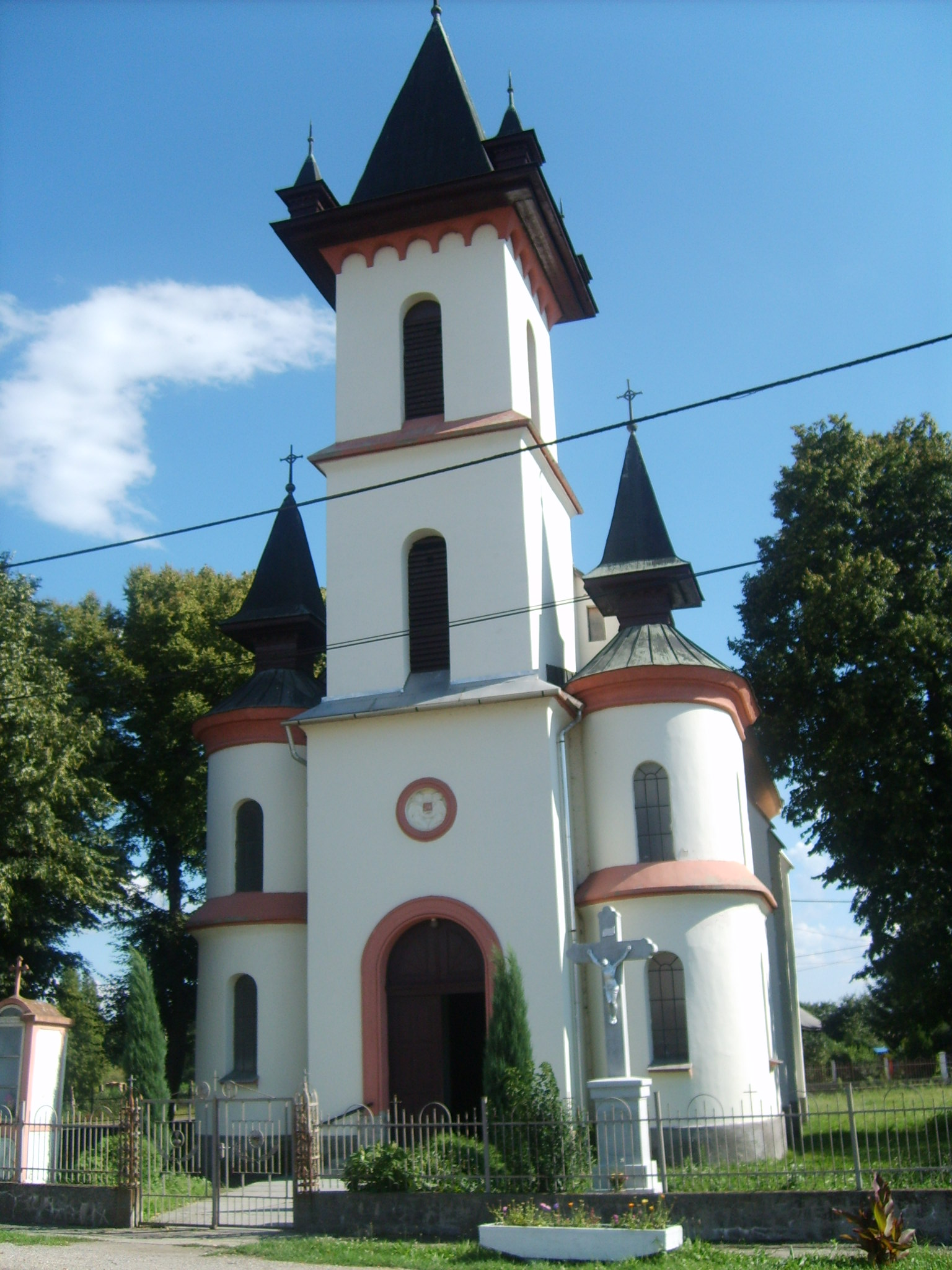 Bánréve Magyarok Nagyasszonya római katolikus templom